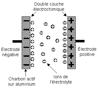 Dessin réalisé pour l'article supercondensateur